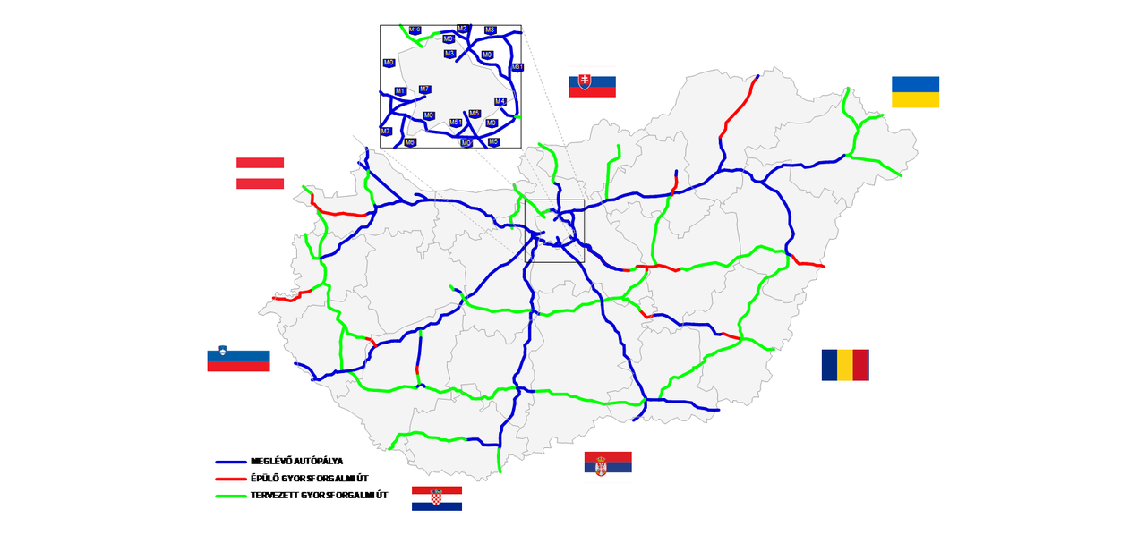 autópálya Magyarországon 2020.02.07 állapot